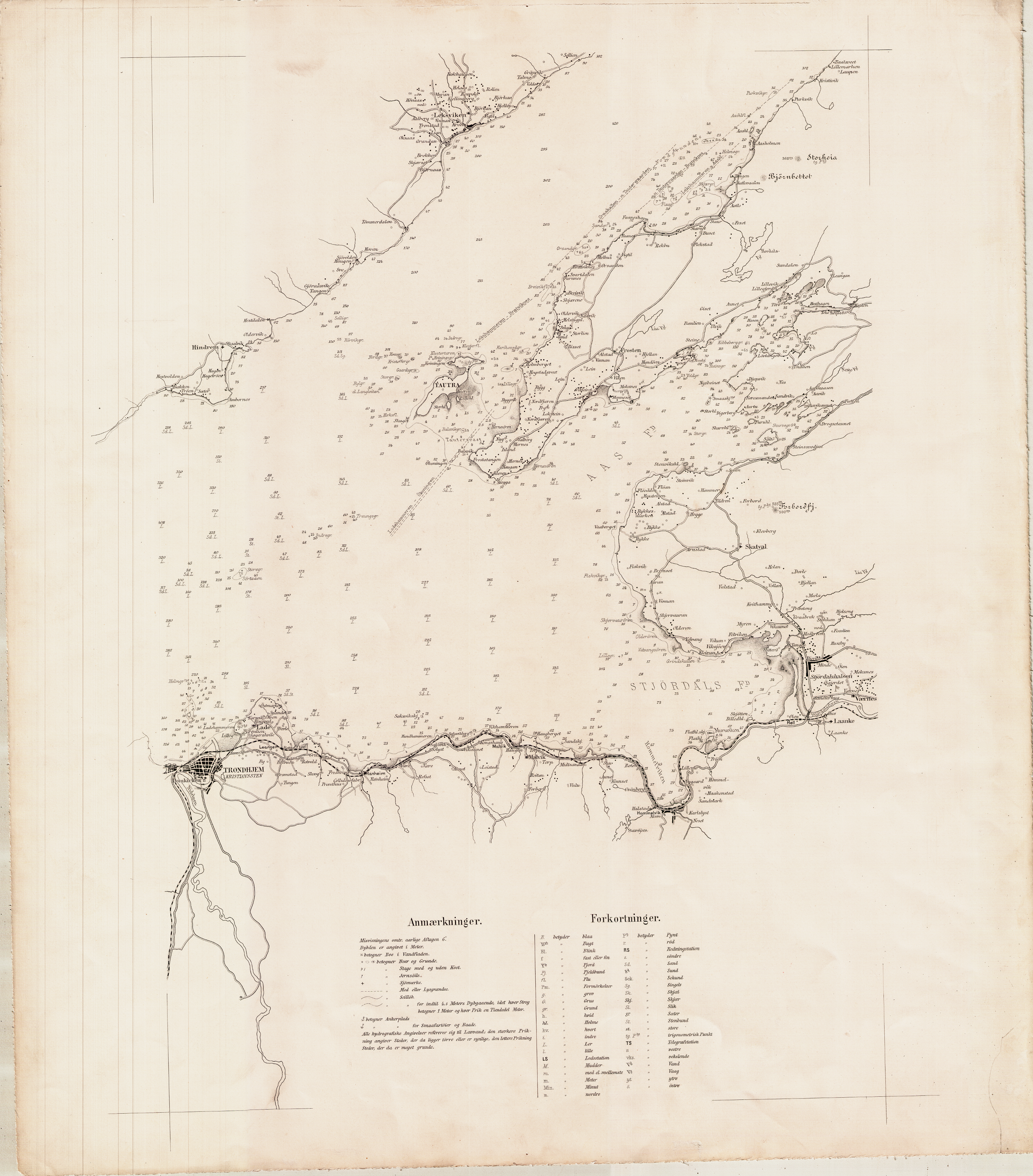 Sjøkart over Trondheimsfjorden fra Stjørdal, forbi Trondheim og opp til Kristivika, fra ukjent årstall. Håndtegnet i ukjent målestokk. Original kartstørrelse ca 58 x 66 cm. Et eksemplar befinner seg hos Statens kartverk Sjø i Stavanger.